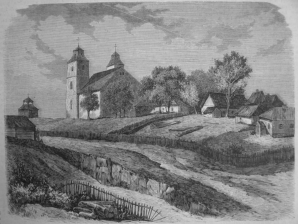 Беларуская (тарашкевіца): Езяросы (Jeziarosy)